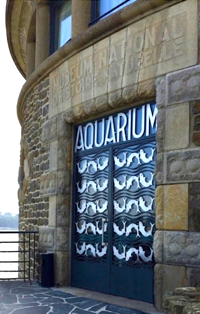 Portail de l'Aquariump-Musée de la mer de Dinard (France)